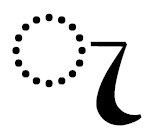 эдапилля